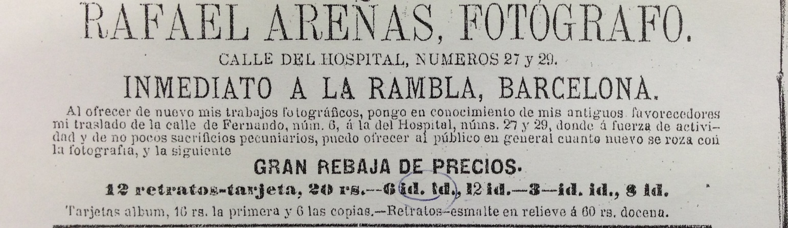 Fotografía d'un un annunci de l'estudi fotogràfic de Rafael Areñas Miret tret de: LEON, D.L.R. Guía consultiva o Indicador General de Barcelona, y particular de todos los puntos de España, ultramar y extranjero [sic] que se inscriban. Barcelona: Establecimiento Tipográfico De Eusebio Riera, 1872, p. 55.